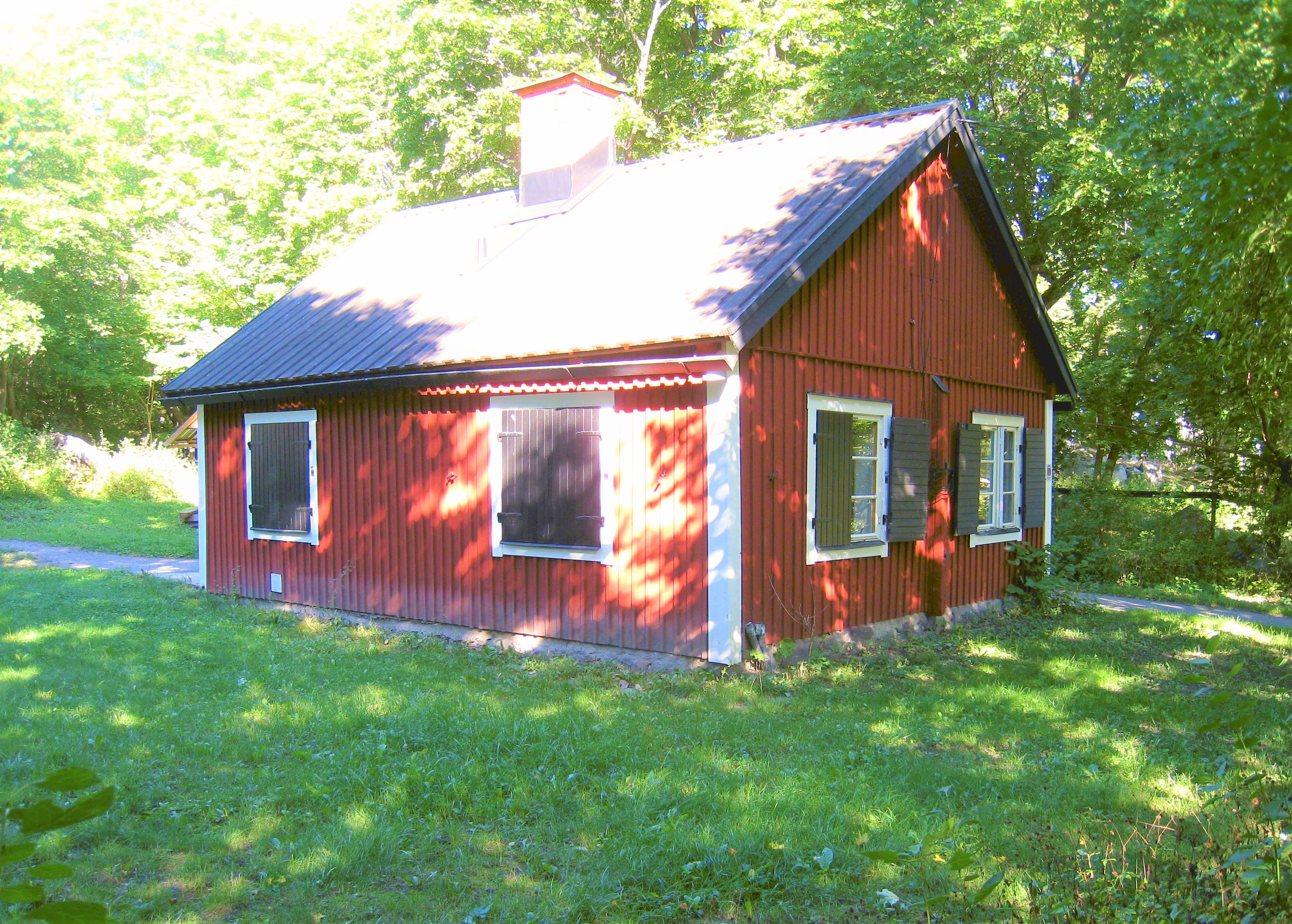 Ladugårdskarlens bostad vid Stora Ängby slott i Norra Ängby, Bromma, väster om Stockholm. Ladugårdskarlsstugan, som är från 1700-talet, ligger i skogsbrynet norr om fatburen.